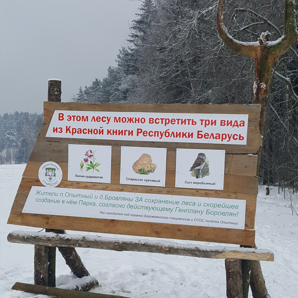 Стенд на опушке леса д.Боровляны